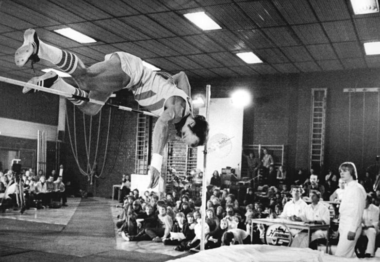 Rolf Beilschmidt ADN-ZB Ludwig-16.1.82 Bez. Erfurt: Hochsprung mit Musik. Rolf Beilschmidt übersprang beim sechsten Arnstädter Hochsprung mit Musik zum 100. Male die 2.20 Meter. Der Jenaer gewann damit das dritte Mal diesen traditionellen Jahresauftakt der DDR-Hochspringer. siehe auch 1982-0116-24,25,26N